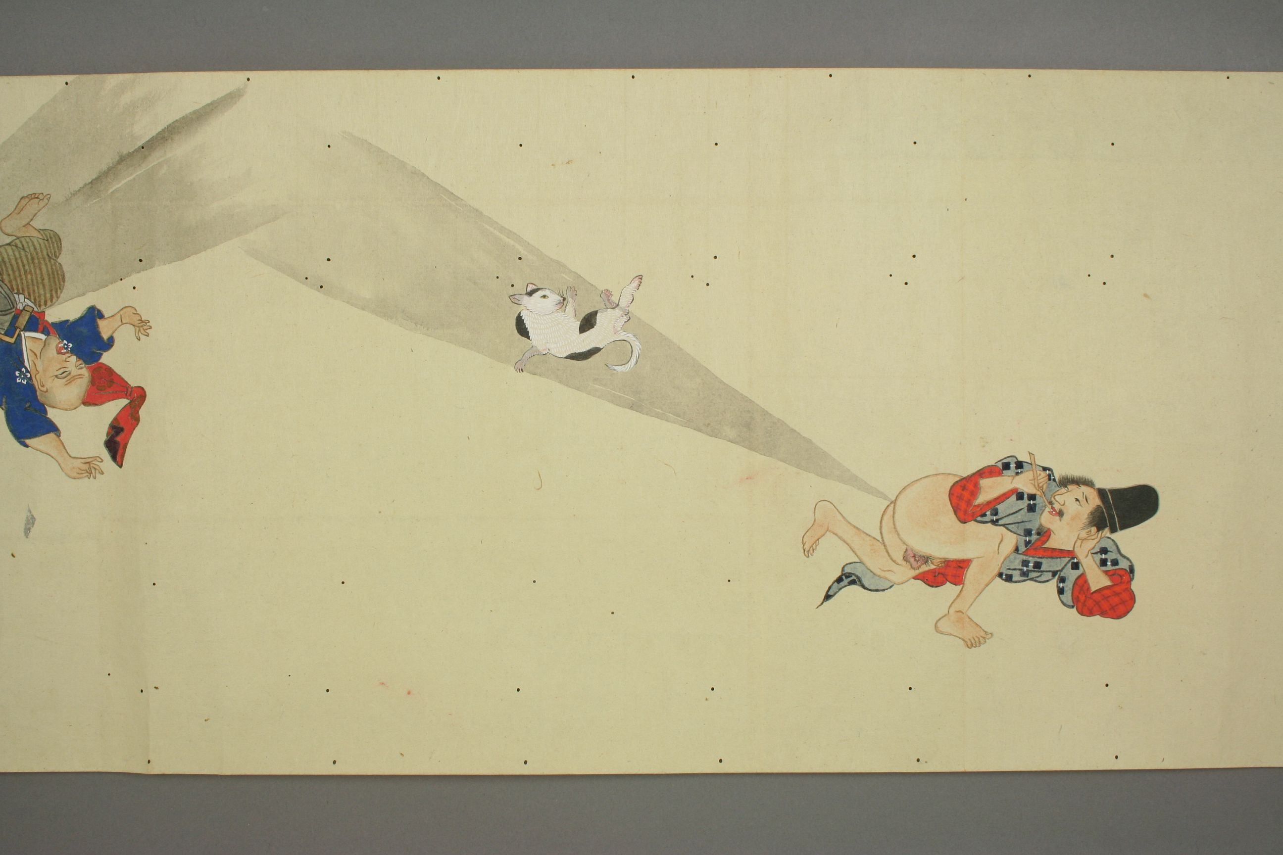 He-gassen, Fart Battle